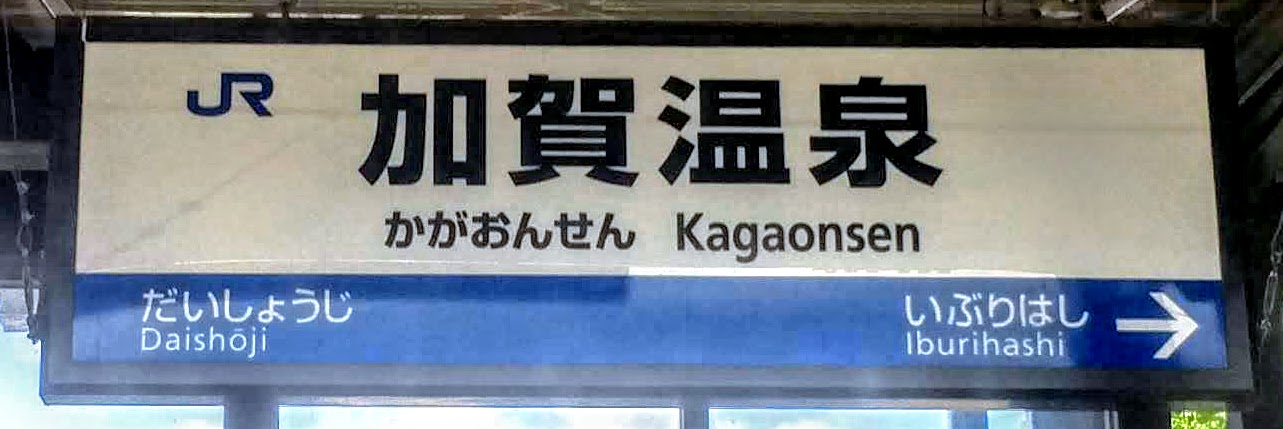 加賀温泉駅の駅名標（LEDタイプ）